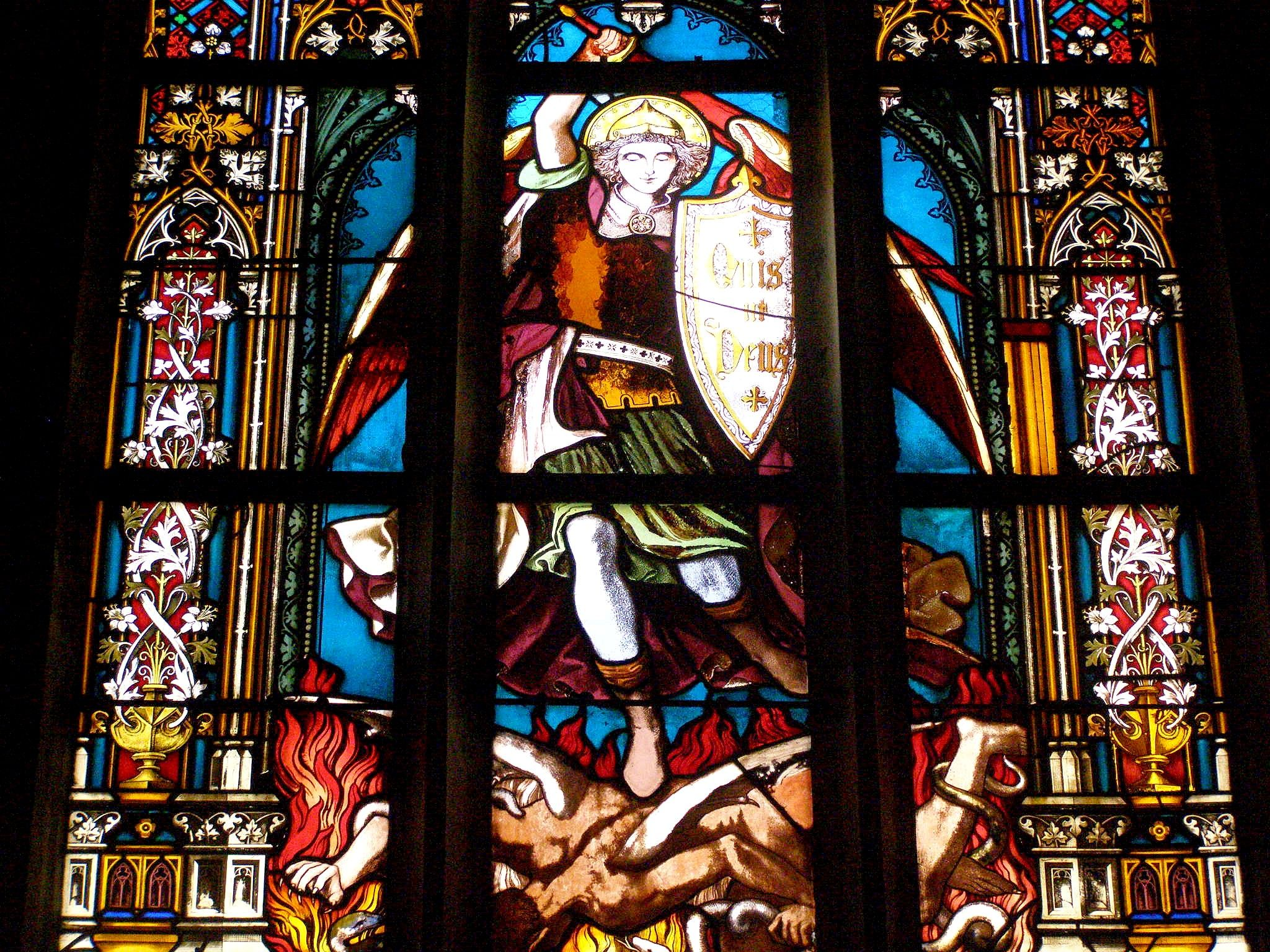 Detail svätého Juraja, ktorí zadupáva draka, symbol satana, do pekelného ohňa